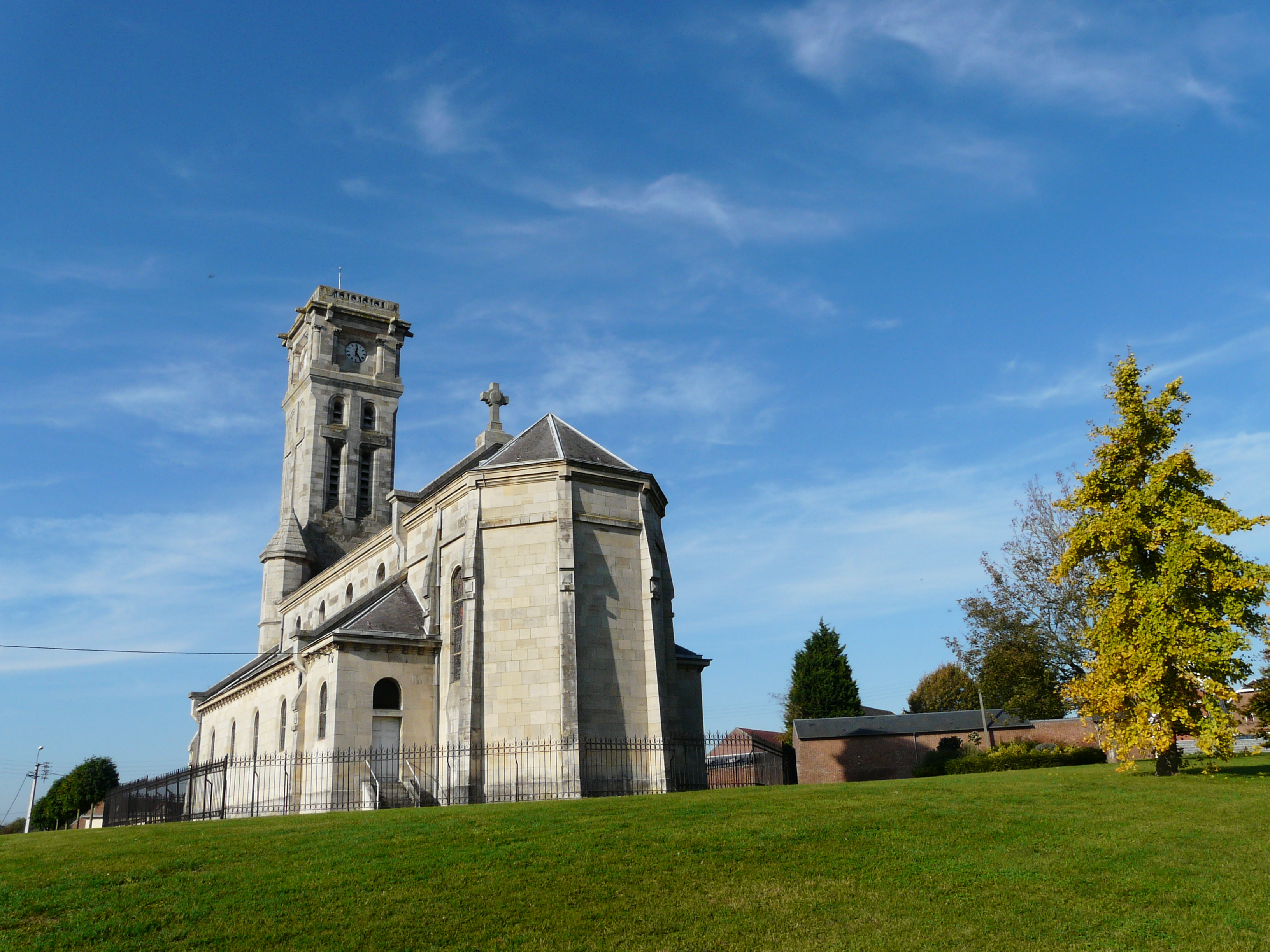 Eglise de Ribécourt-la-Tour (Nord, France) reconstruite après la 1ere Guerre mondiale